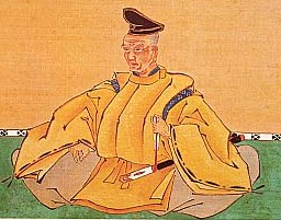 近松門左衛門肖像画（自画像、1725年）